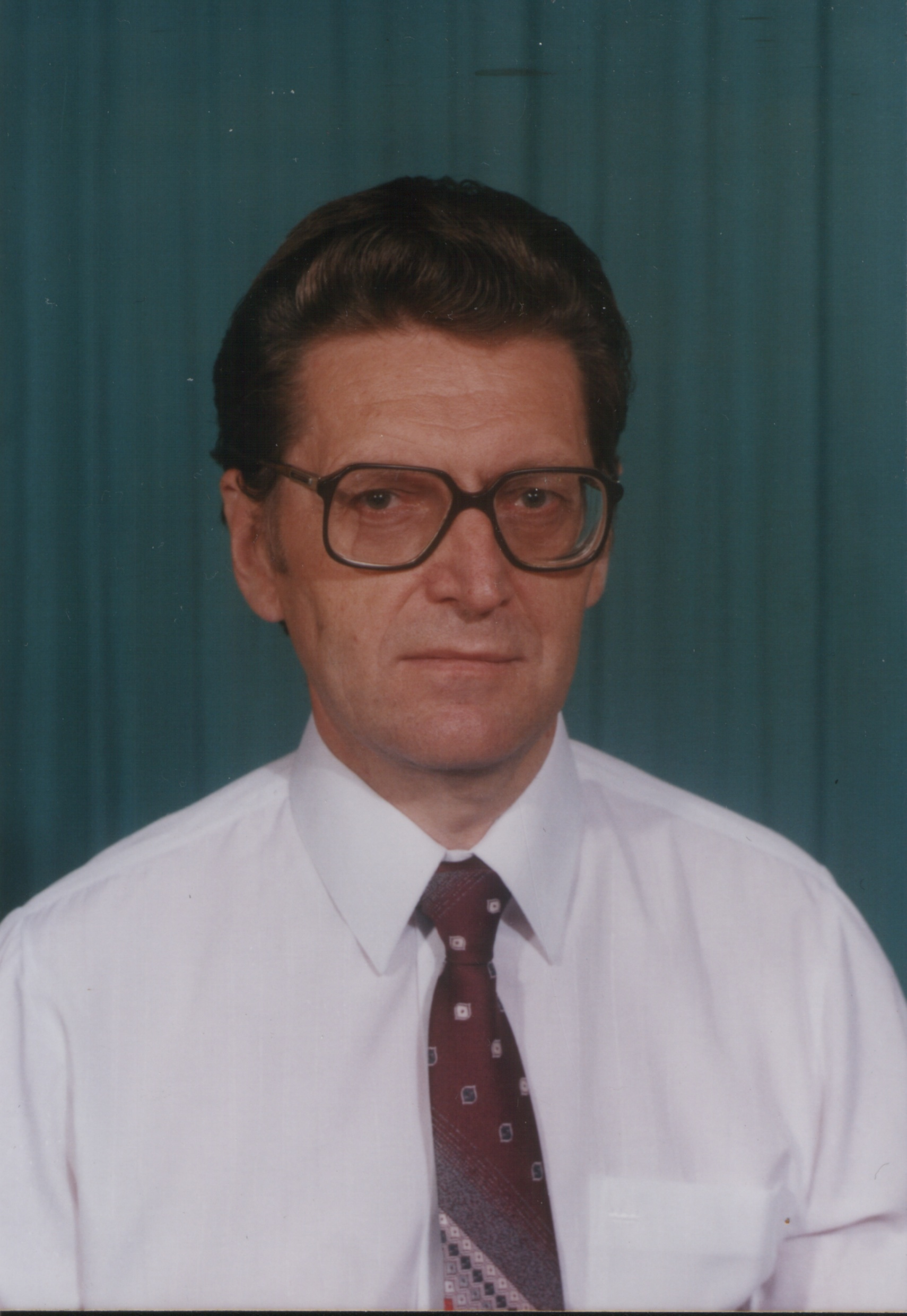 Опейда Й.О.: Фото